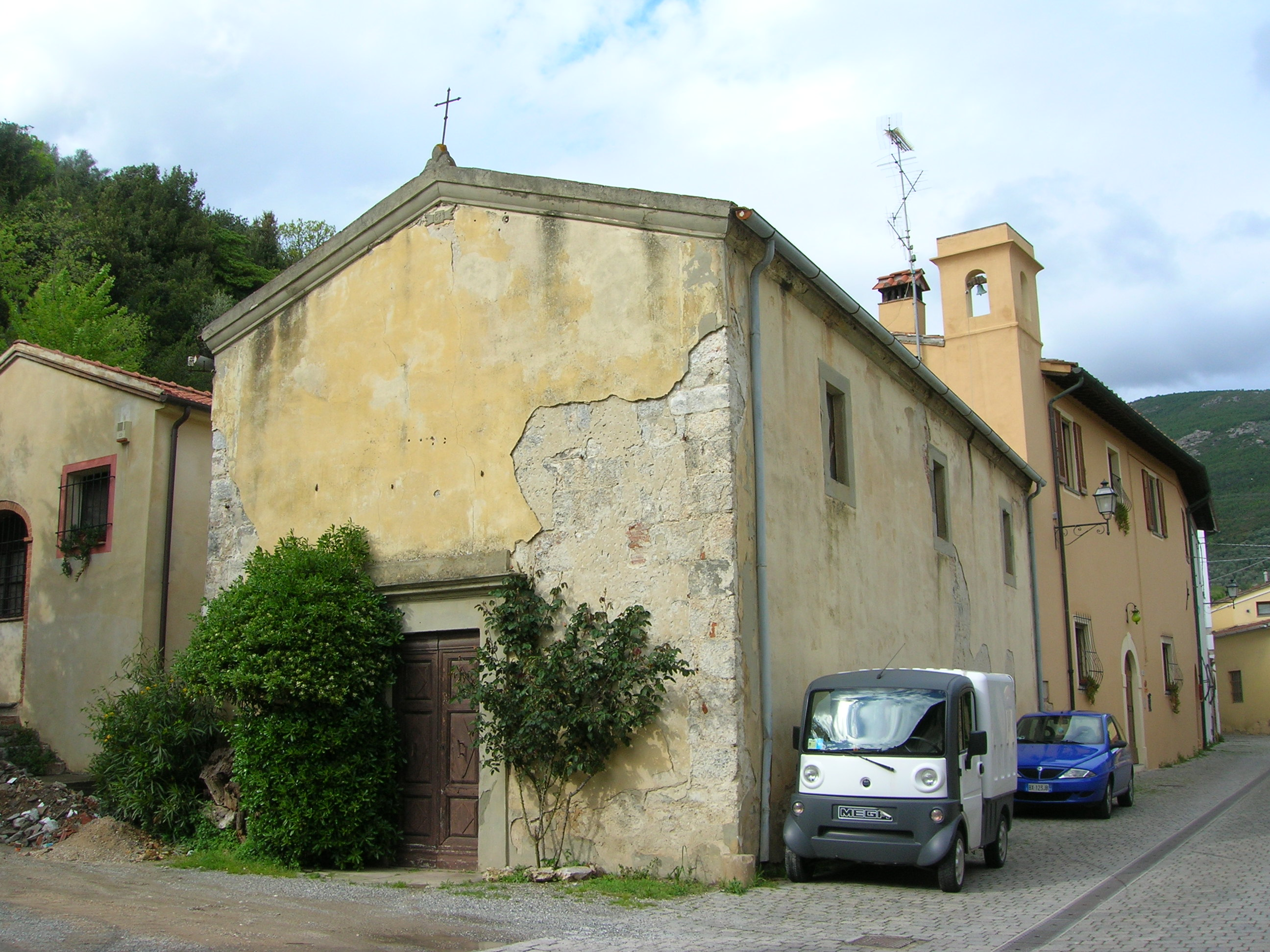 Chiesa di San Domenico a Noce - Uliveto Terme (PI)